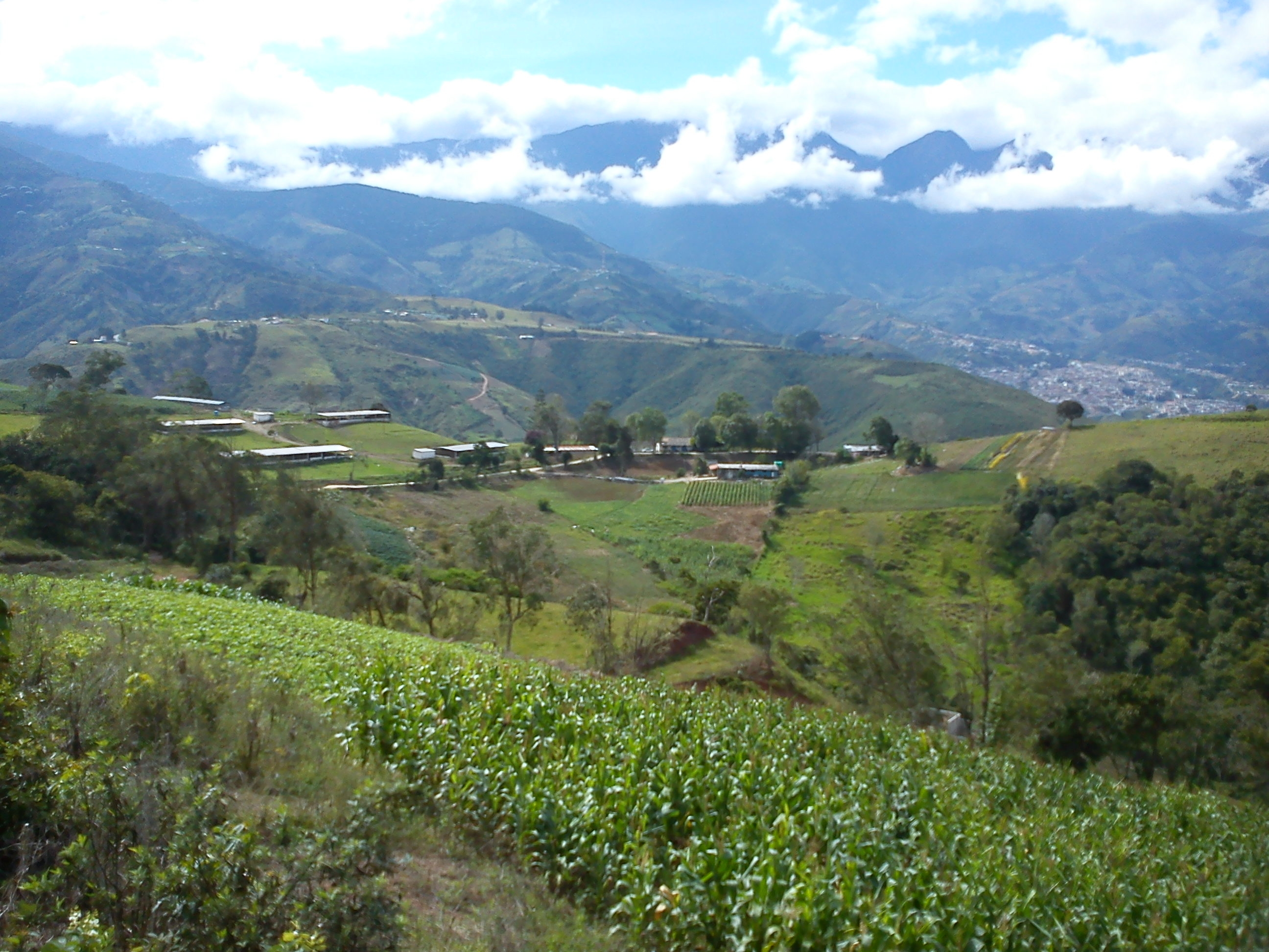 Estado Tachira